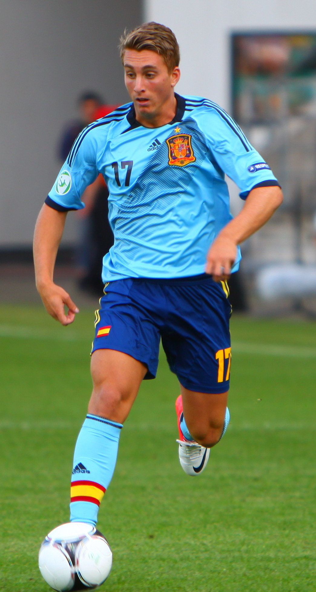 U-19 Portugal vs Spain.